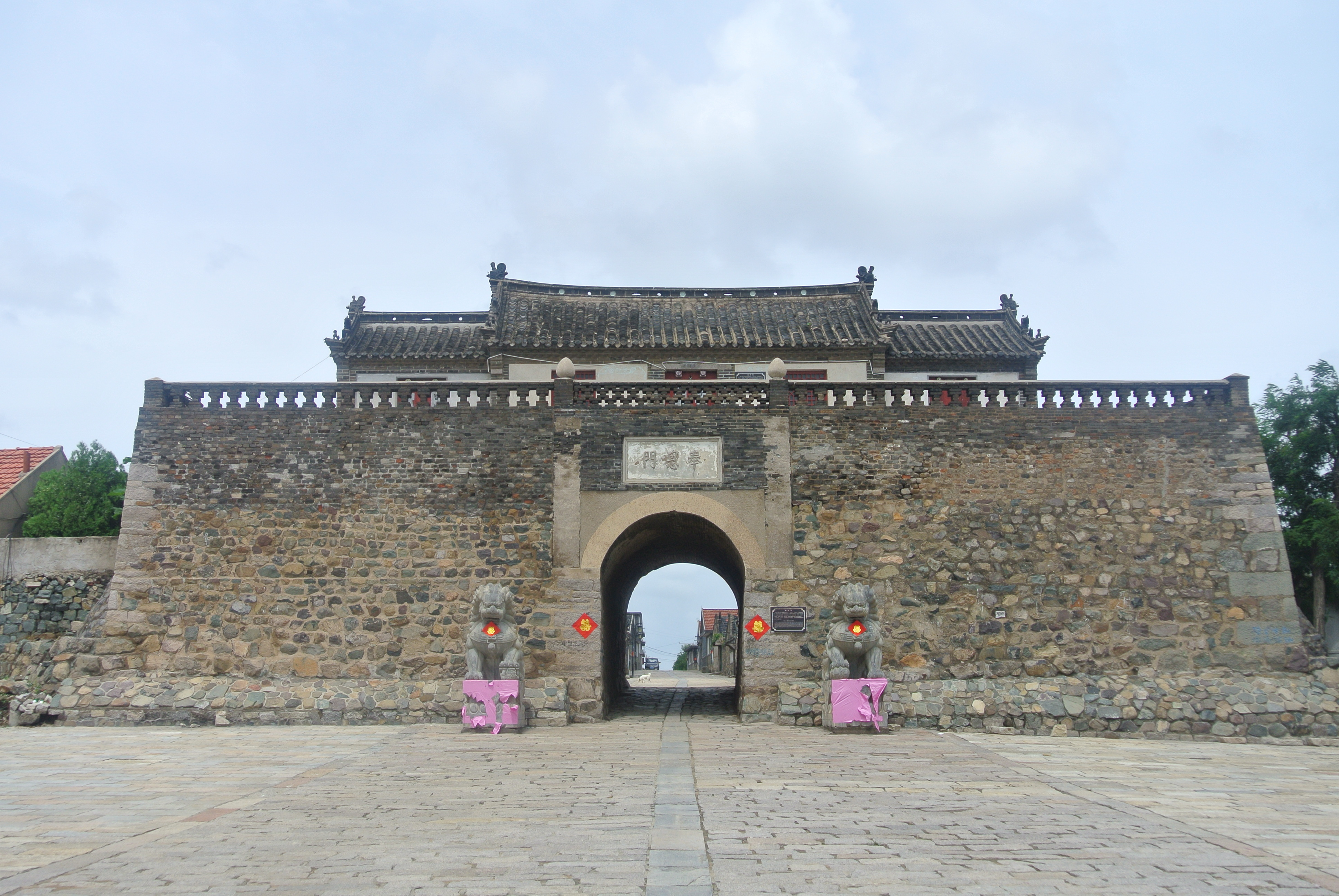 雄崖所奉恩门